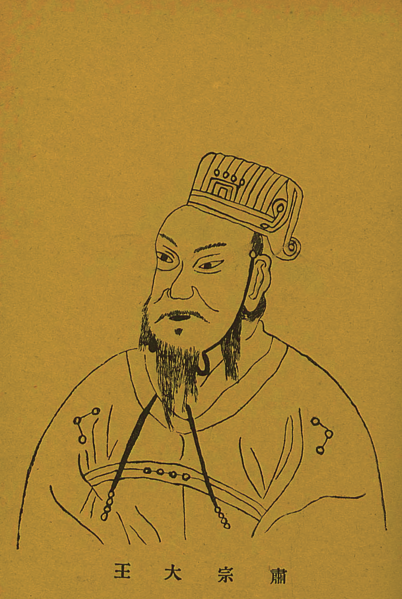 숙종 어진 하응달 모사본, 1926년작 타 서적에서 보고 모사한 작으로 원본은 미상